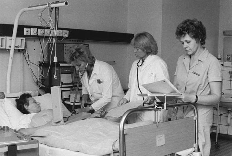 ADN-ZB Ritter 7.11.86 Berlin: Die Intensivbeobachtungsstation für Herz-Kreislauferkrankungen im Krankenhaus Berlin-Köpenick - im Krankenhaus Berlin-Köpenick - eine von 14 derartigen Stationen in Krankenhäusern der Hauptstadt - nimmt jährlich 240 Infarktpatienten auf. Seit 1986 arbeitet das Berliner Gesundheitswesen nach einer weiterentwickelten Konzeption zur Prophylaxe, Therapie und Rehabilitation von Erkrankungen des Herz-Kreislauf-Systems. Heute können dadurch bereits 70 Prozent aller Infarktpatienten im arbeitsfähigen Alter wieder in das Berufsleben eingegliedert werden. Vor zehn Jahren waren es nur etwa 30 Prozent. - Siehe auch Motiv 21 N